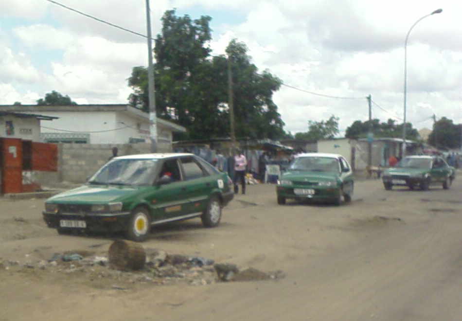 Taxis de Brazzaville, République du Congo. (Toyota Corolla)